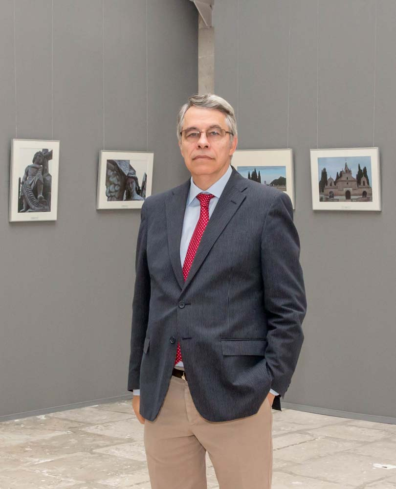 Jesús Urrea. 2015. Patio de la Casa de las Conchas (Valladolid), sala de exposiciones temporales del MUVa